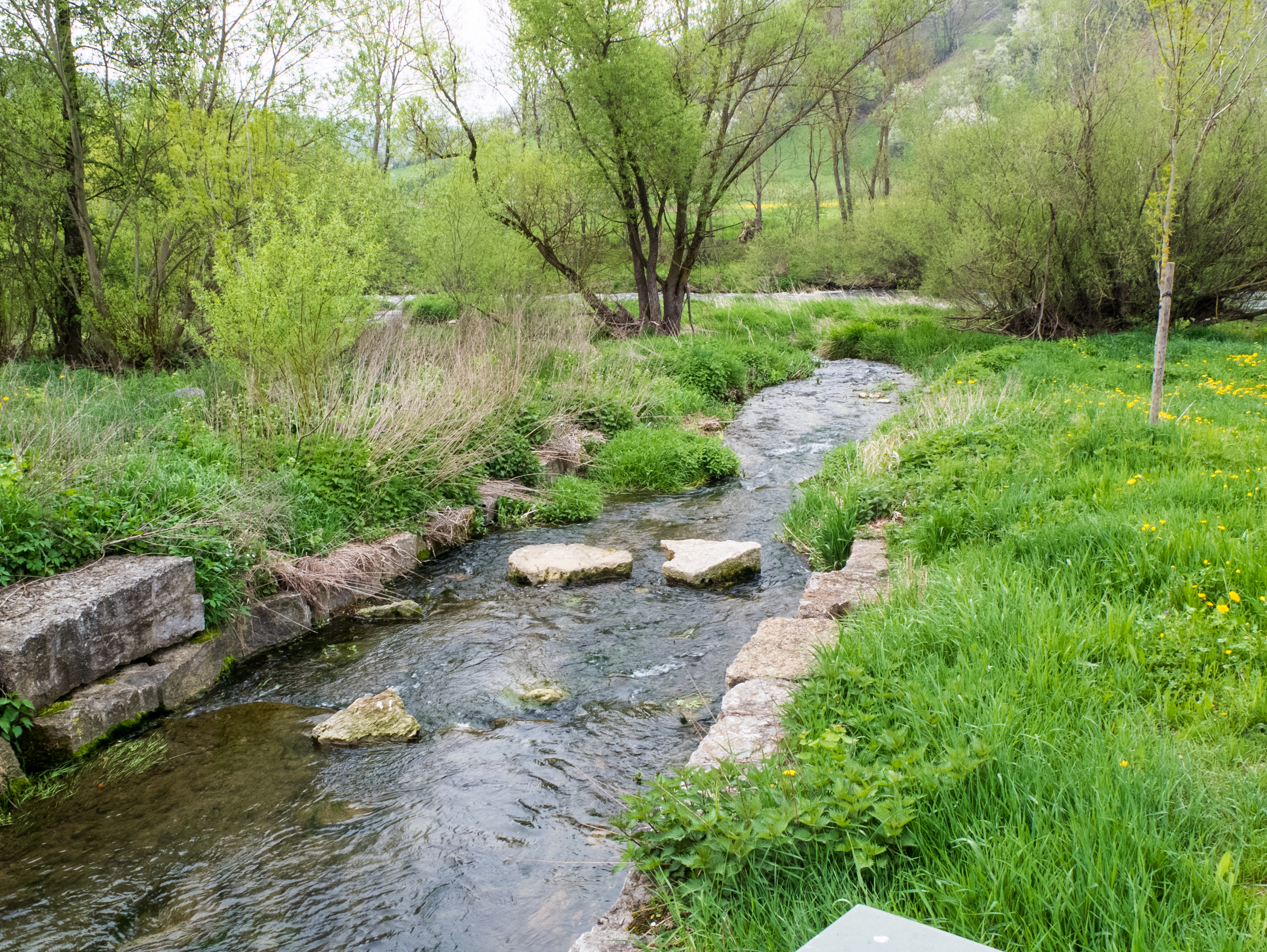 Der Forellenbach an seiner Mündung in die Jagst